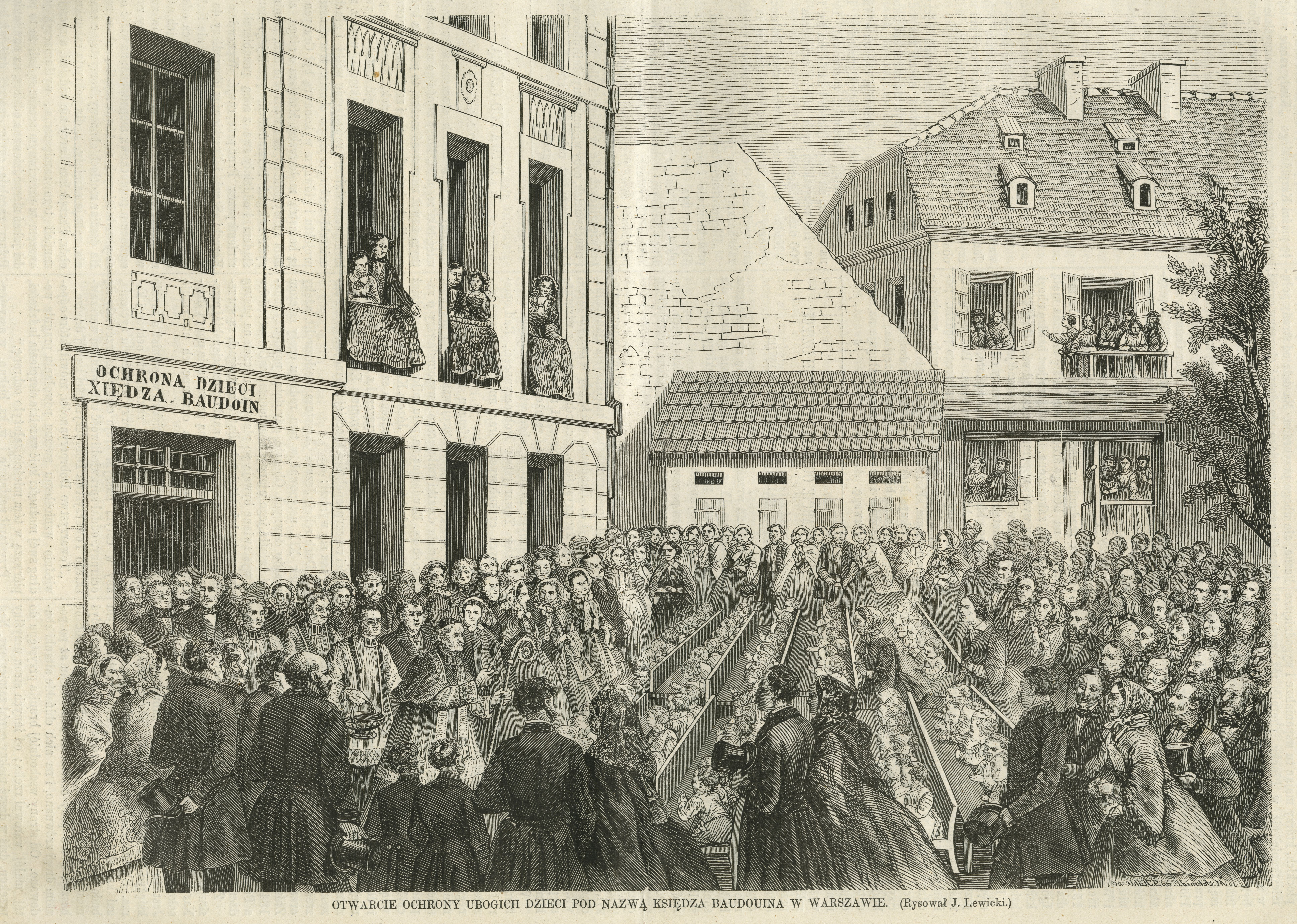 Otwarcie ochrony ubogich dzieci pod nazwą księdza Baudouina w Warszawie